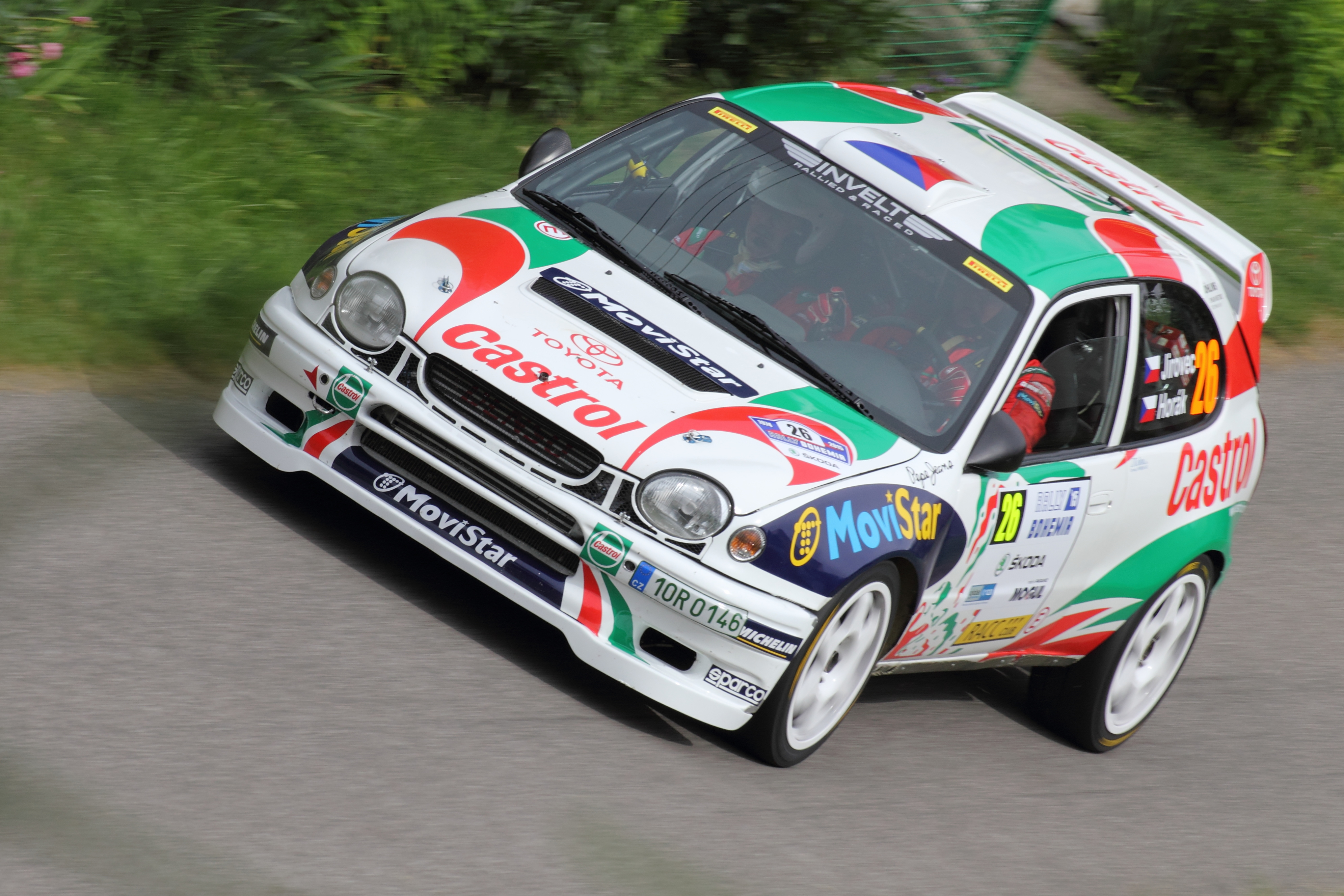 Rally Bohemia 2015 - Jirovec, Toyota Corolla WRC